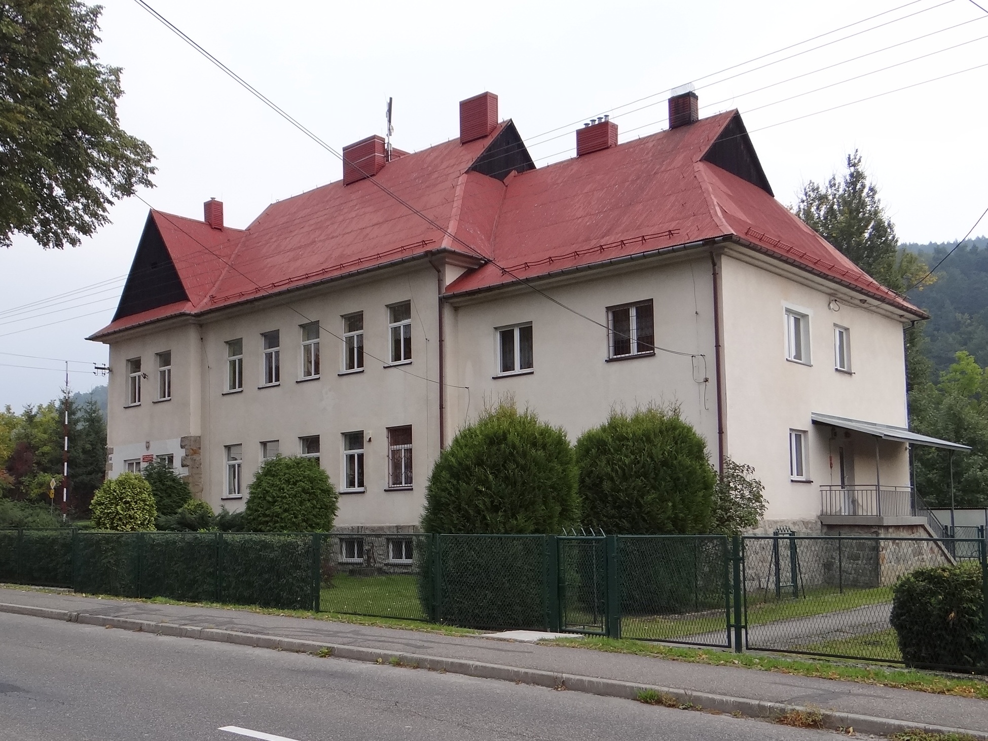 Szkoła w Kocierzu Moszczanickim